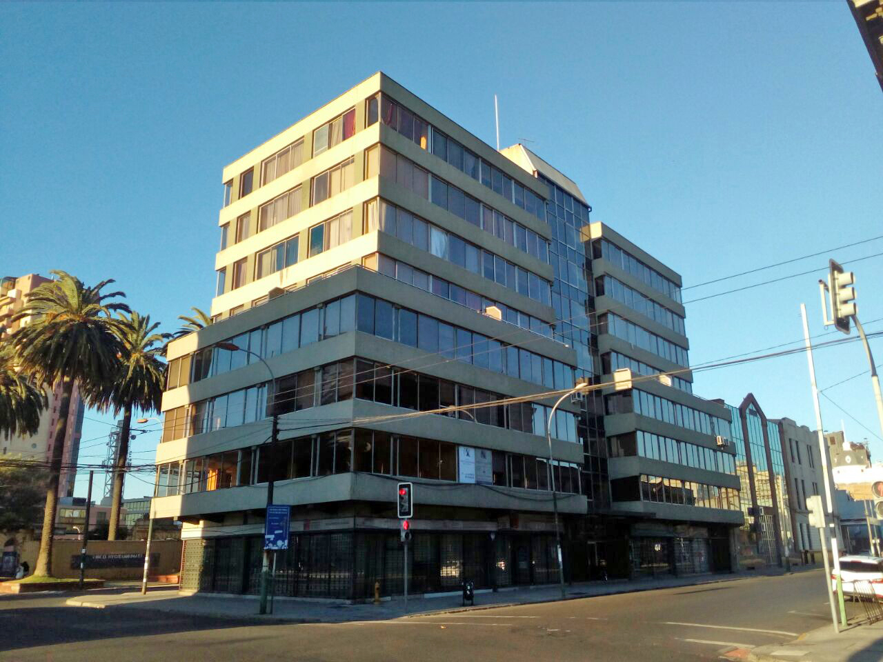 Edificio Soria Servicios de la Universidad de Valparaíso: - Oficina de Aranceles - Dirección de Asuntos Estudiantiles - Fondo Solidario de Crédito Universitario - Servicio Médico de Alumnos Calle Yungay 1731, Valparaíso, Chile